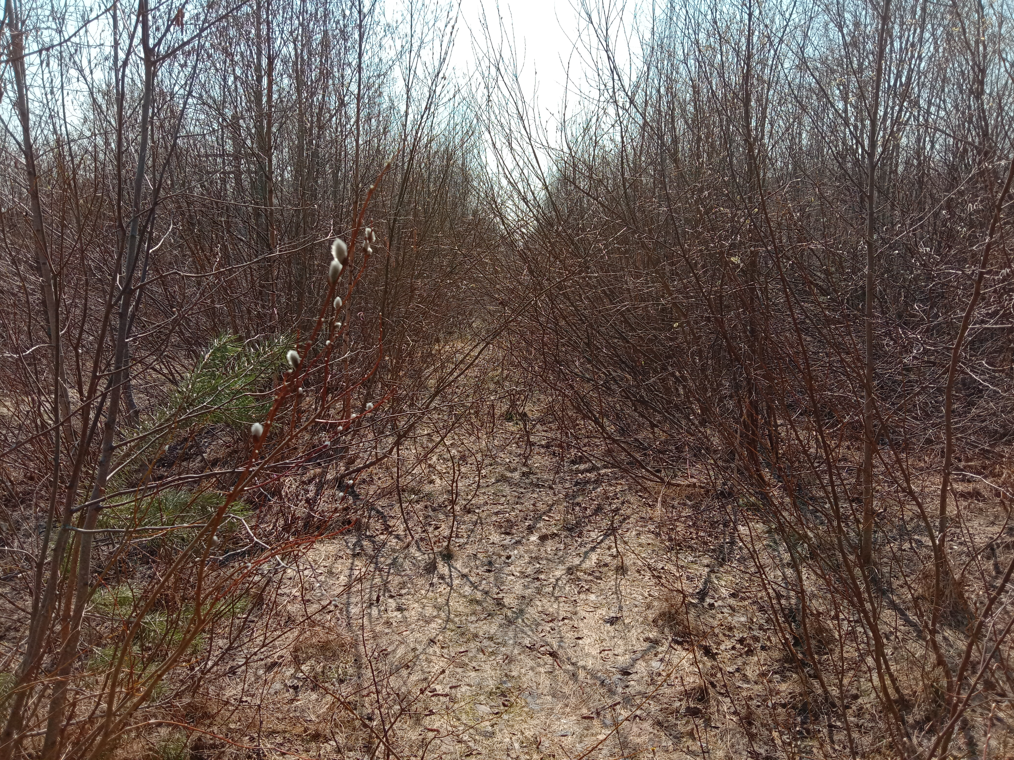 Ляскеля подъездной путь